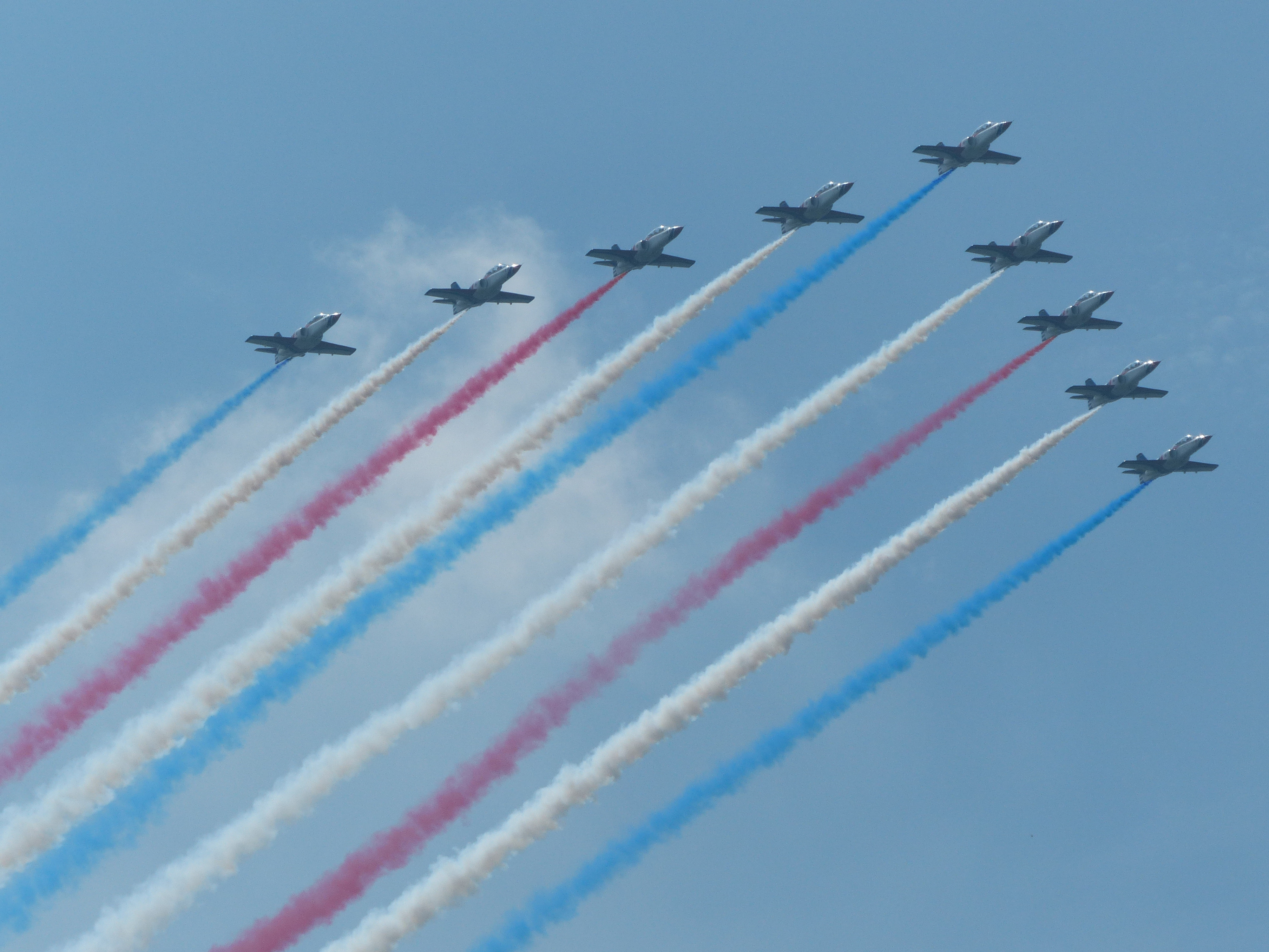 2014年陸軍官校營區開放活動開幕表演，空軍雷虎小組以九機V字編隊由西而東衝場通過陸軍官校。